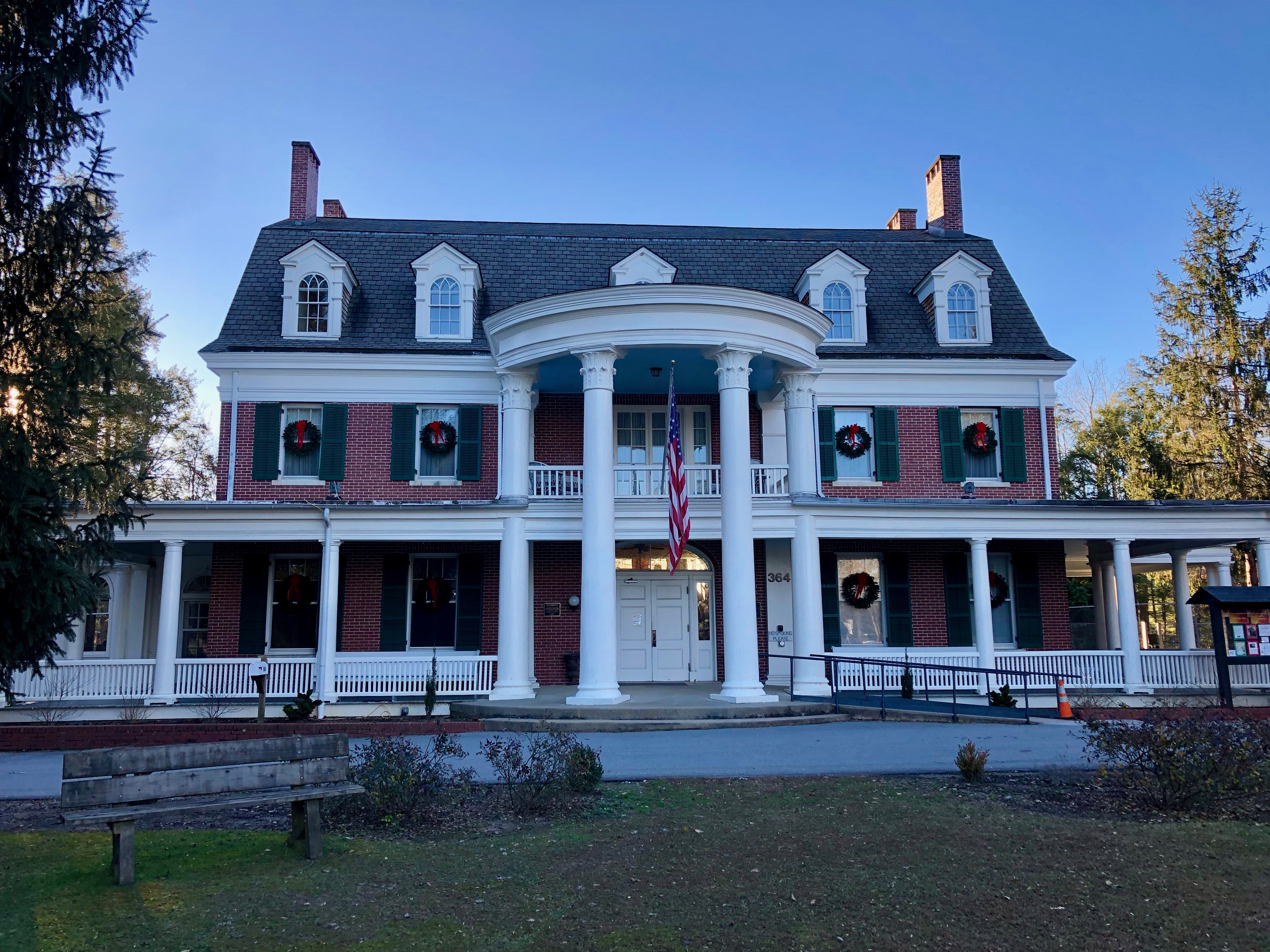 Silvermont, Brevard, NC